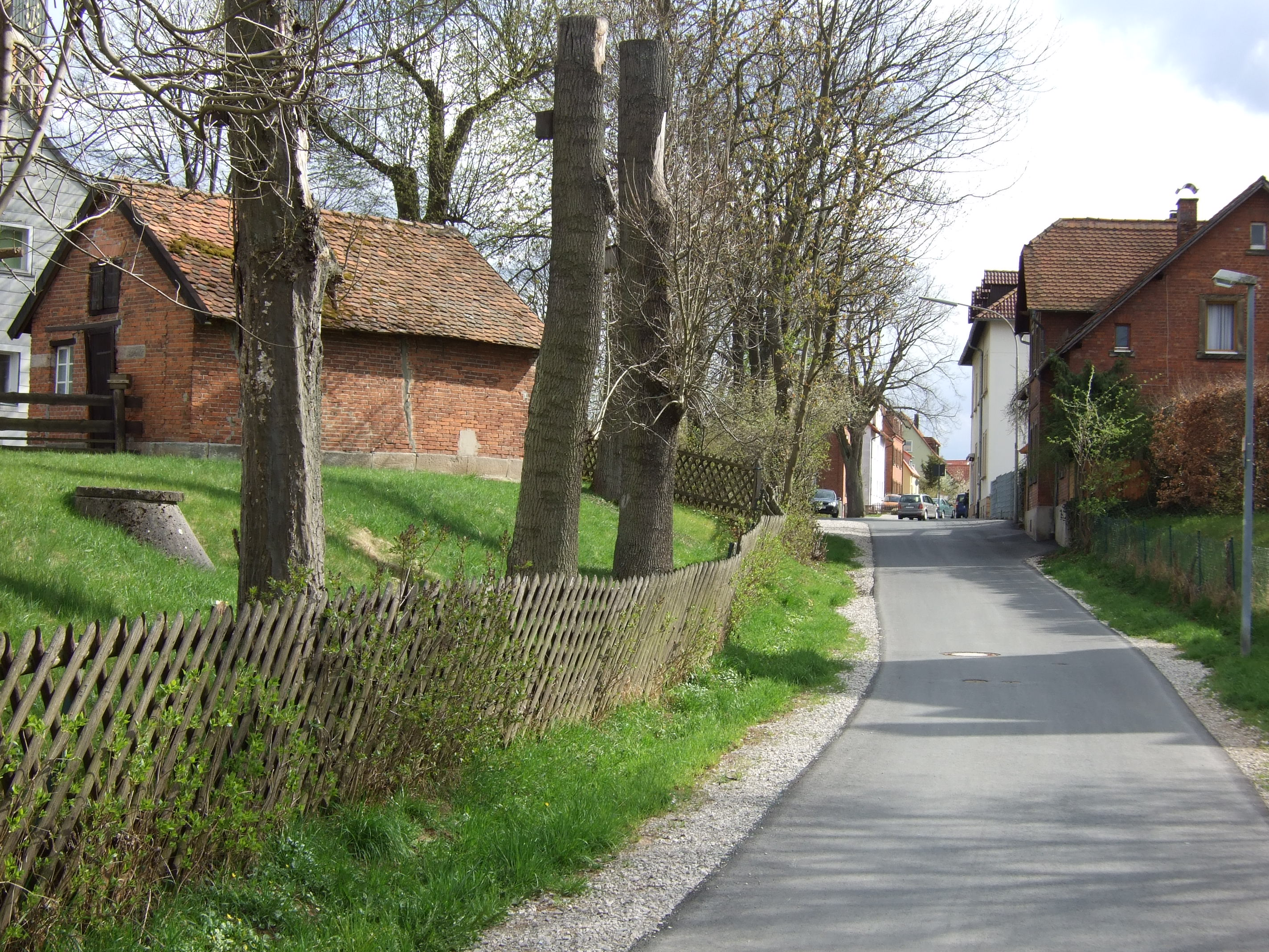 Jakobstraße Bayreuth